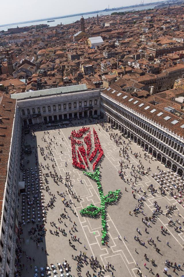 Il "Bocol" in Piazza San Marco